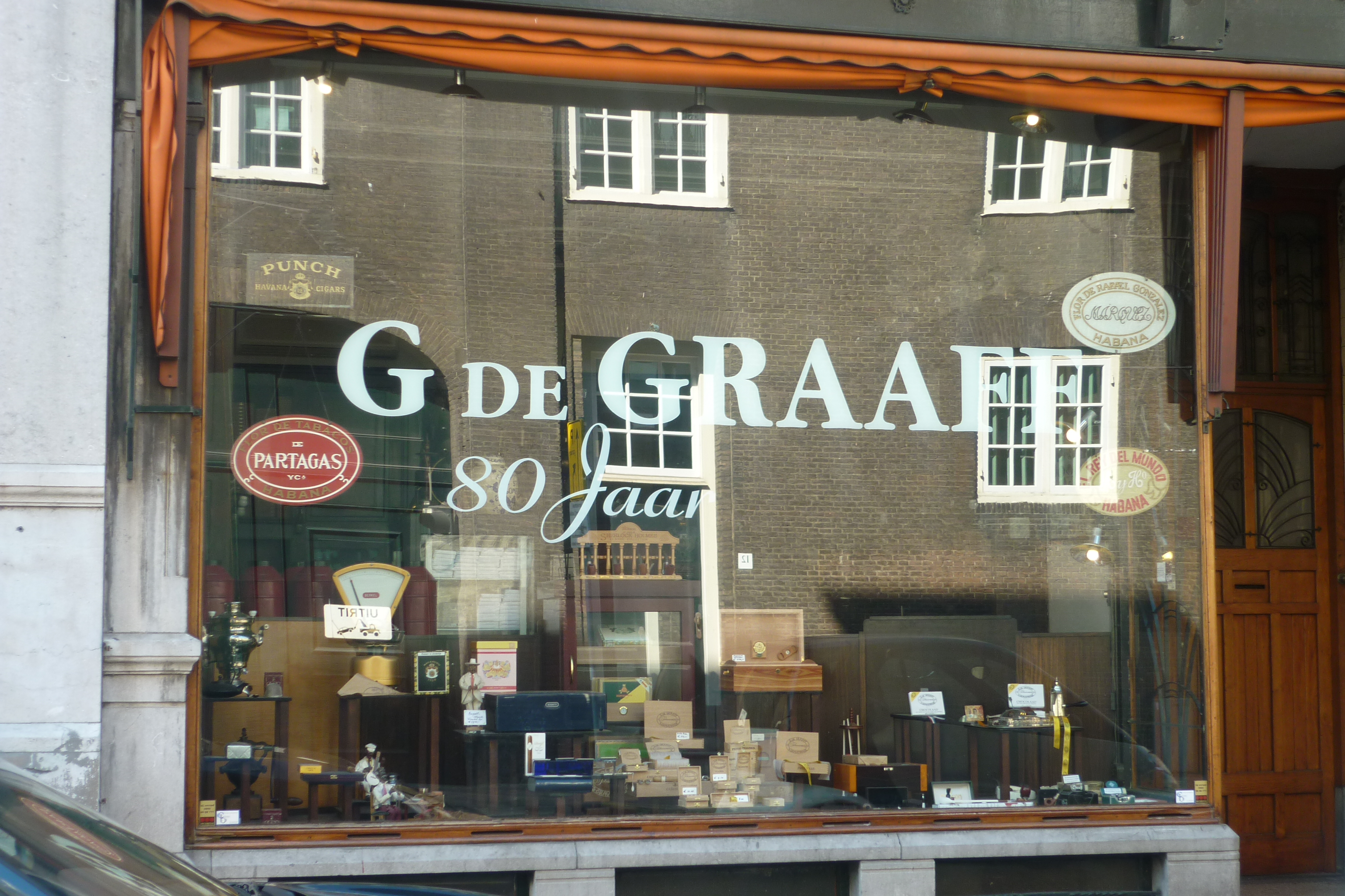 Heulstraat Den Haag, sigarenwinkel De Graaff